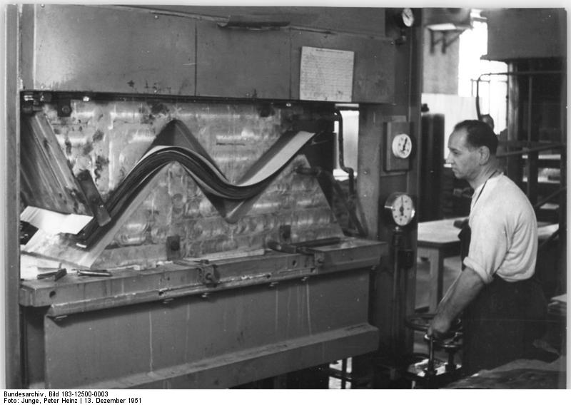 Hellerau, Möbelfabrik, Stuhlpresse Illus Junge 13.12.1951 Deutsche Werke in Hellerau bei Dresden - VEB Möbelbau. Im Betrieb wurde ein neuer Stuhl entwickelt, der aus kleinsten beleimten Fournieren gepresst wird. Die Stuhlpresse.